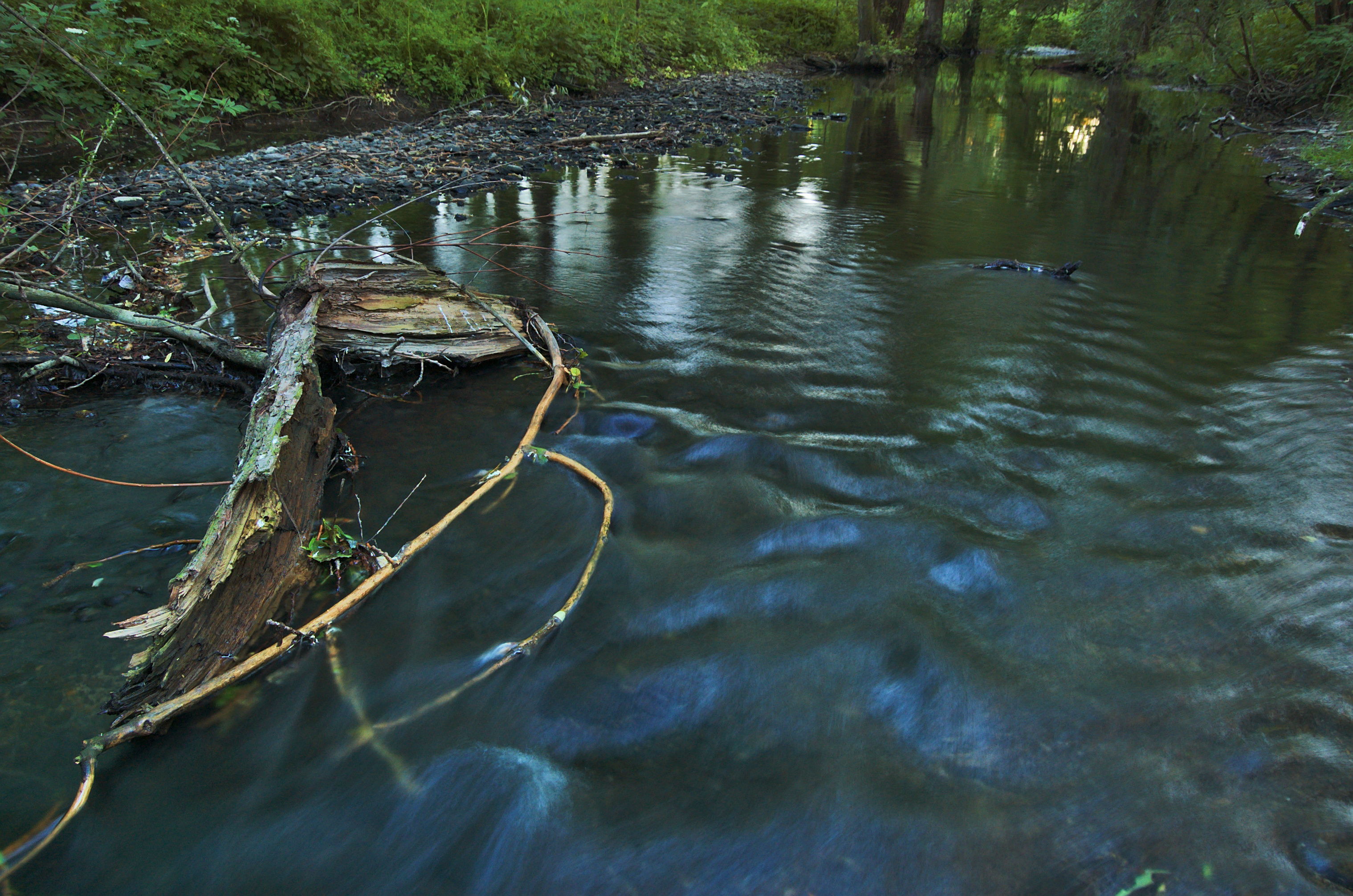 Romže, Smržice, okres Prostějov